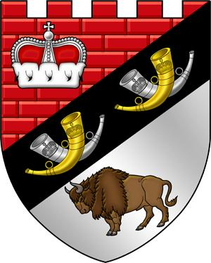 Малы герб Белавежскай пушчы